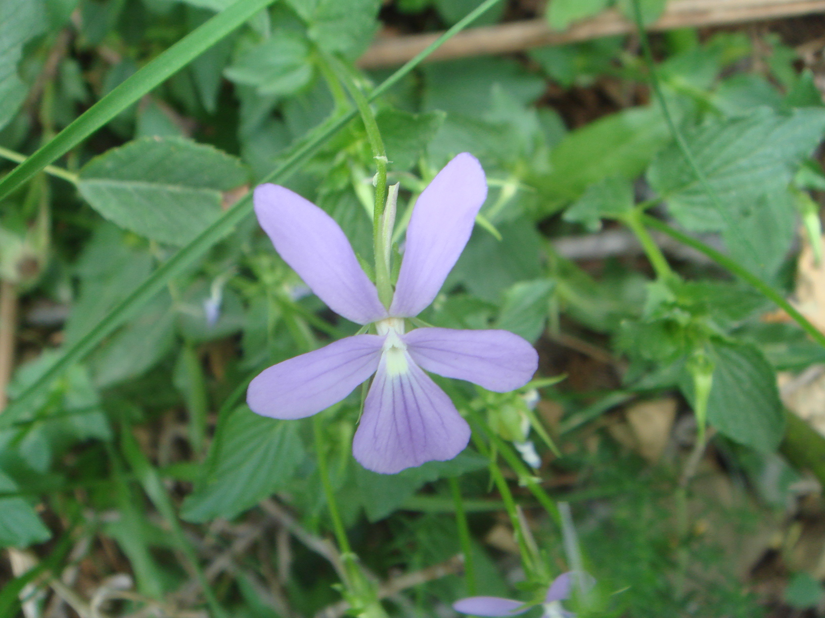 Pensamiento pirenaico (Viola cornuta), Valle de Pineta, Pirineos, (Huesca), España.